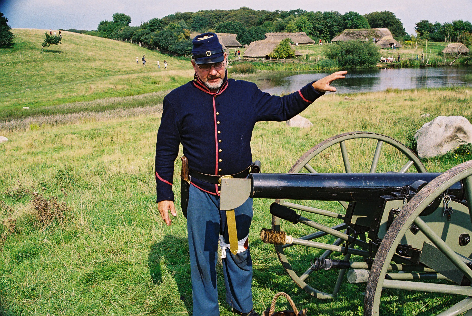 D. 26. august 2006 blev Slaget ved Bentonville, North Carolina 19-21. marts 1865 demonstreret i Lejre Forsøgscenter. Her var der bl.a. 'reenactere' fra 4th US Light Artillery (se På billedet ses en 3-inch Ordnance Rifle Cannon i miniudgave, med svamp, kradser og ladestok. Artilleristen på billedet er ved at rette kanonen ind mod et mål.